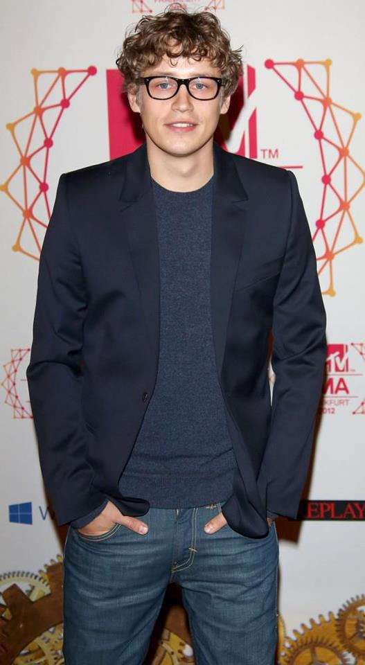 Portrait von Tim Bendzko von Dezember 2012